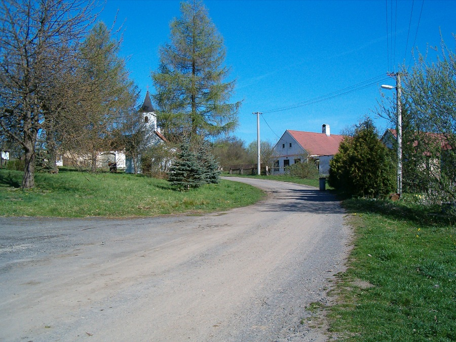 Náves v Kadolci